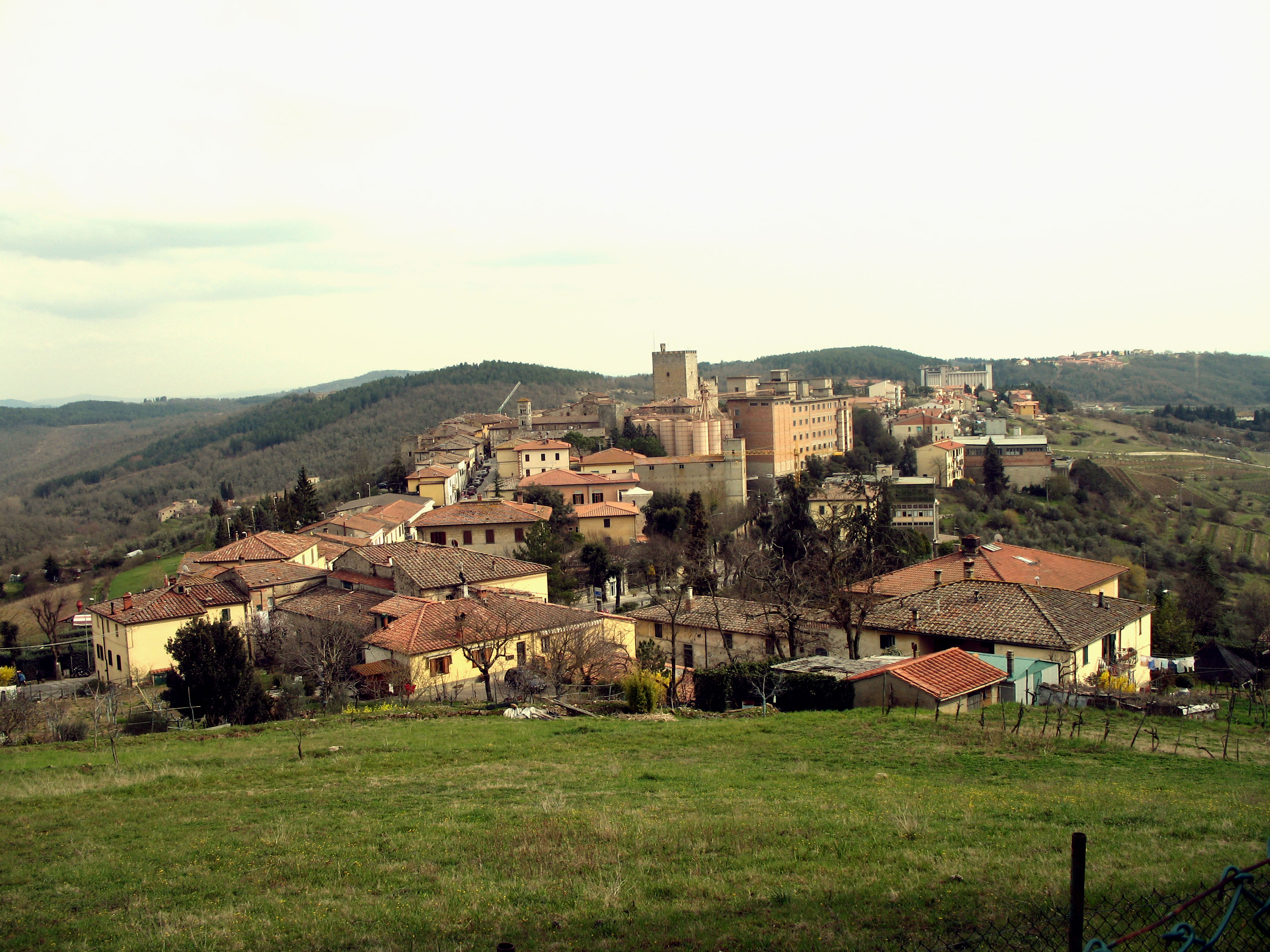 CASTELLINA IN CHIANTI Panorama.Foto Personale.